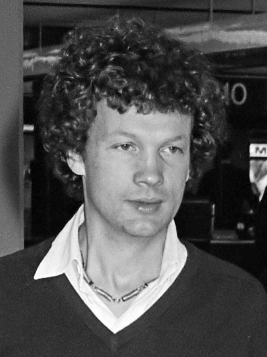 Nationale hockeyploeg (heren) naar WK Argentinie; Maarten Sikking (l) en Paul Litjens 15 maart 1978